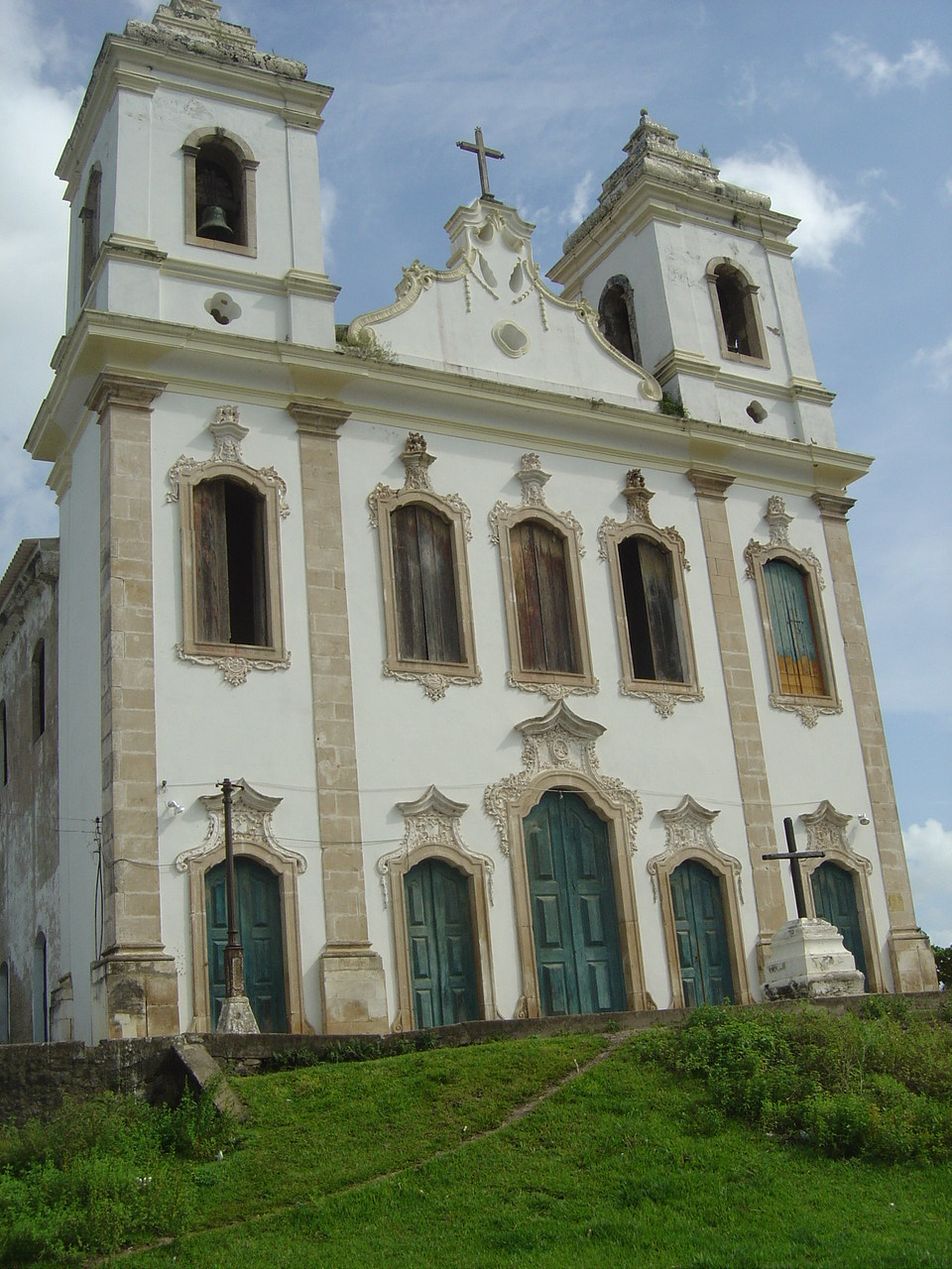 Igreja Matriz de Santiago do Iguape em Candeis, Bahia, Brasil,início da construção em 1691 e final em 1724. Foto minha propria. Data 15 de novembro de 2006. Trancoso 02:26, 21 November 2006 (UTC)